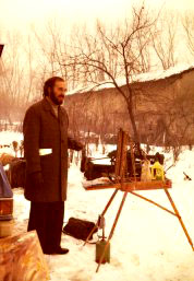 Julio Ducuron pintando en L´Olona. Italia. 1976.